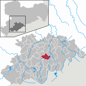 Thermalbad Wiesenbad im Erzgebirgskreis, Sachsen